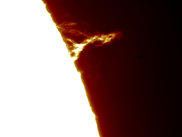 20070406sol160342